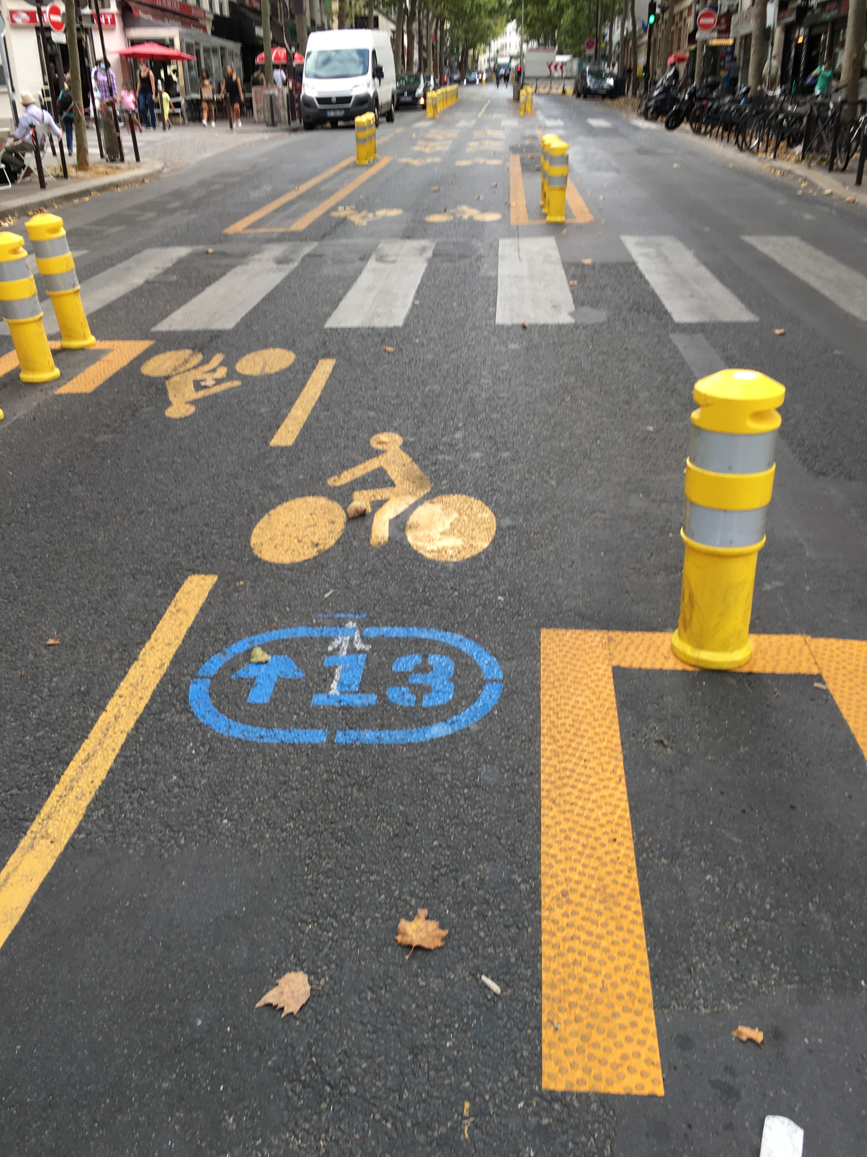 Marquage au sol de la piste cyclable provisoire Vélopolitain 13, avenue de Saint-Ouen à Paris